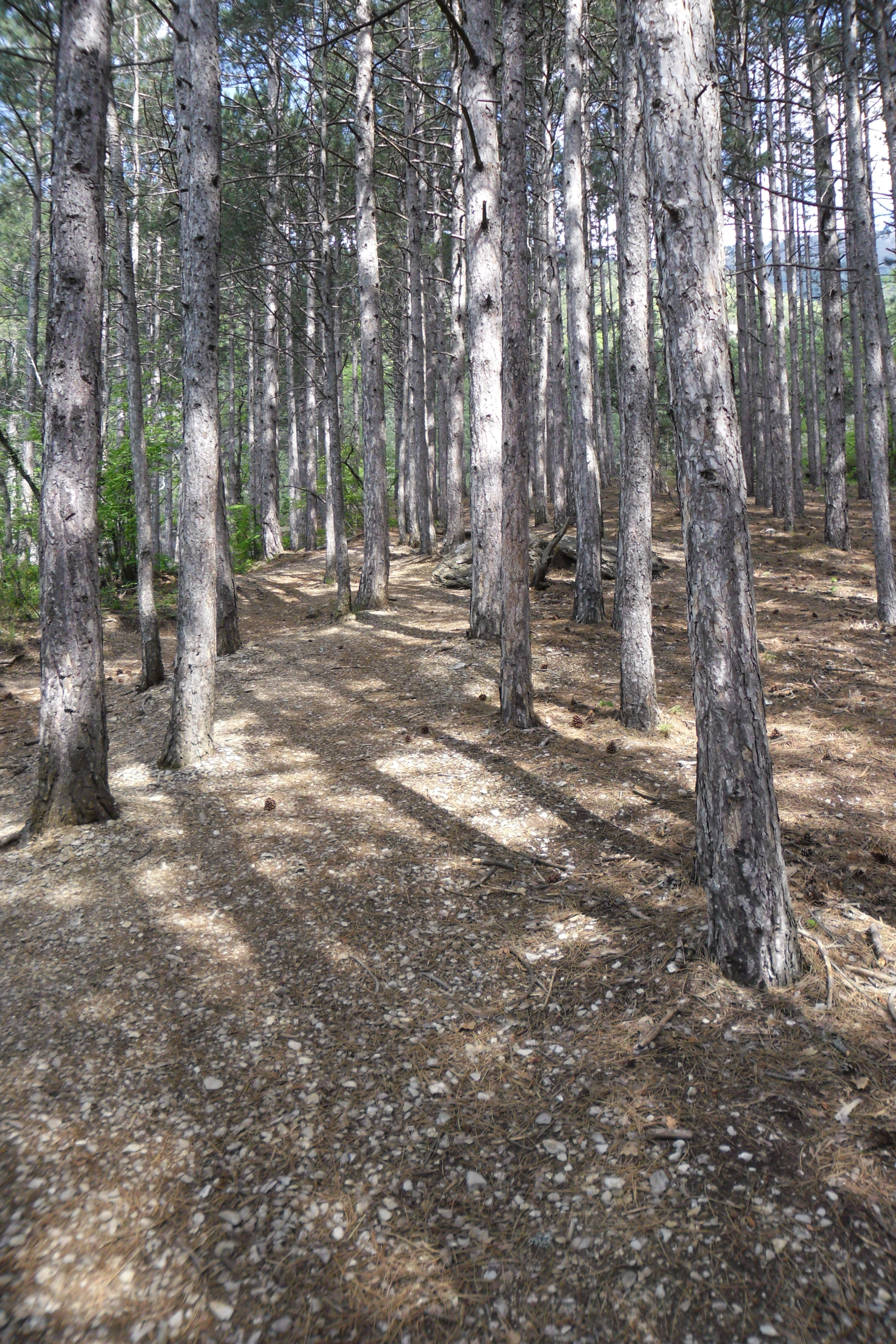 Фото